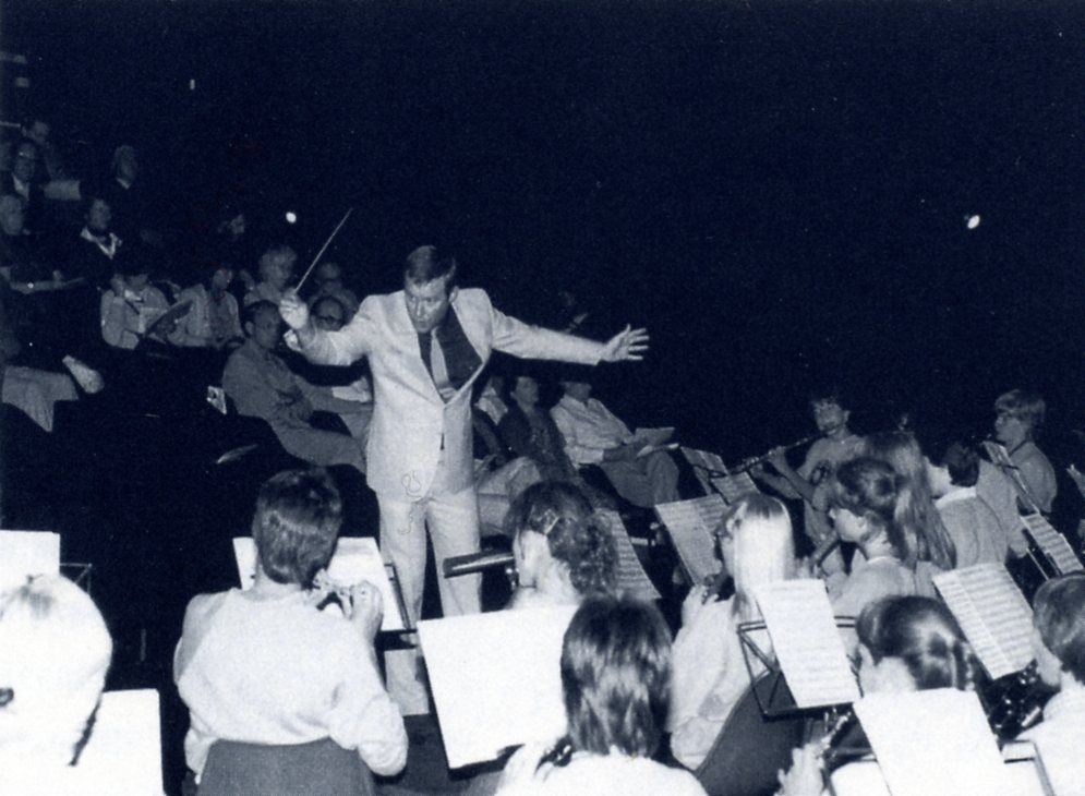 Het schoolorkest van het Bisschoppelijk College Broekhin in Bristol o.l.v. Hans Meeuws, juli 1982.